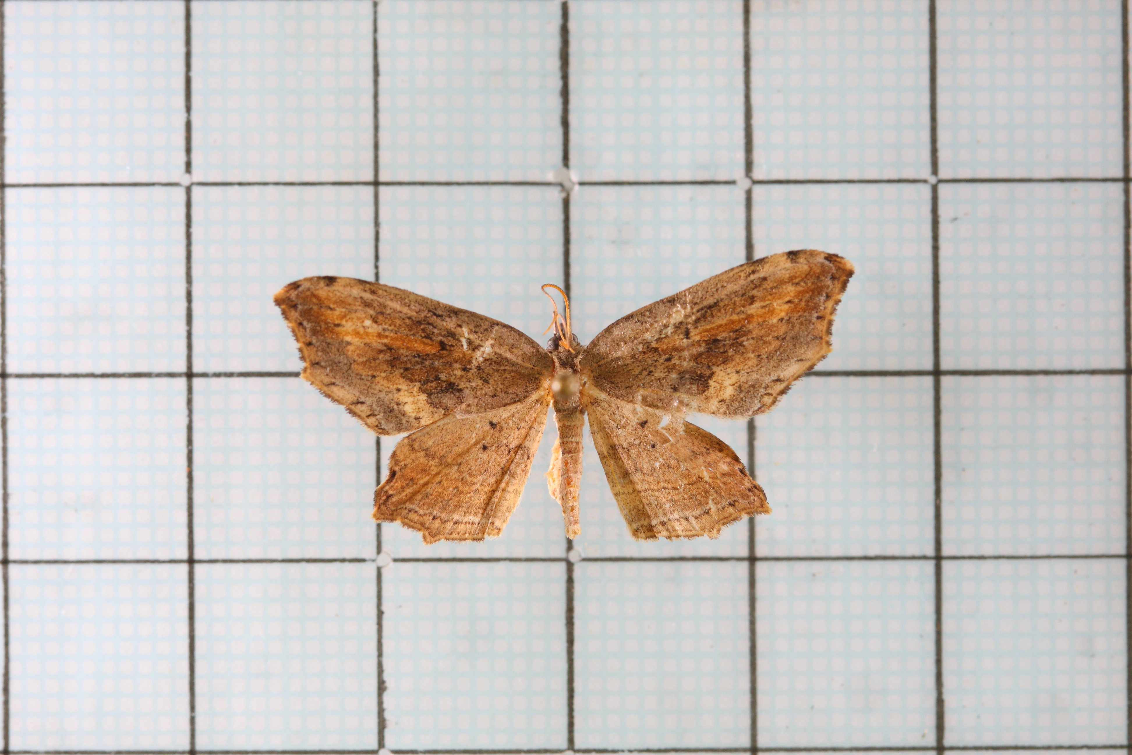 Phalacra strigata insulicola Inoue, 1988 凹角鉤蛾 認識台灣的昆蟲 10 :P.62